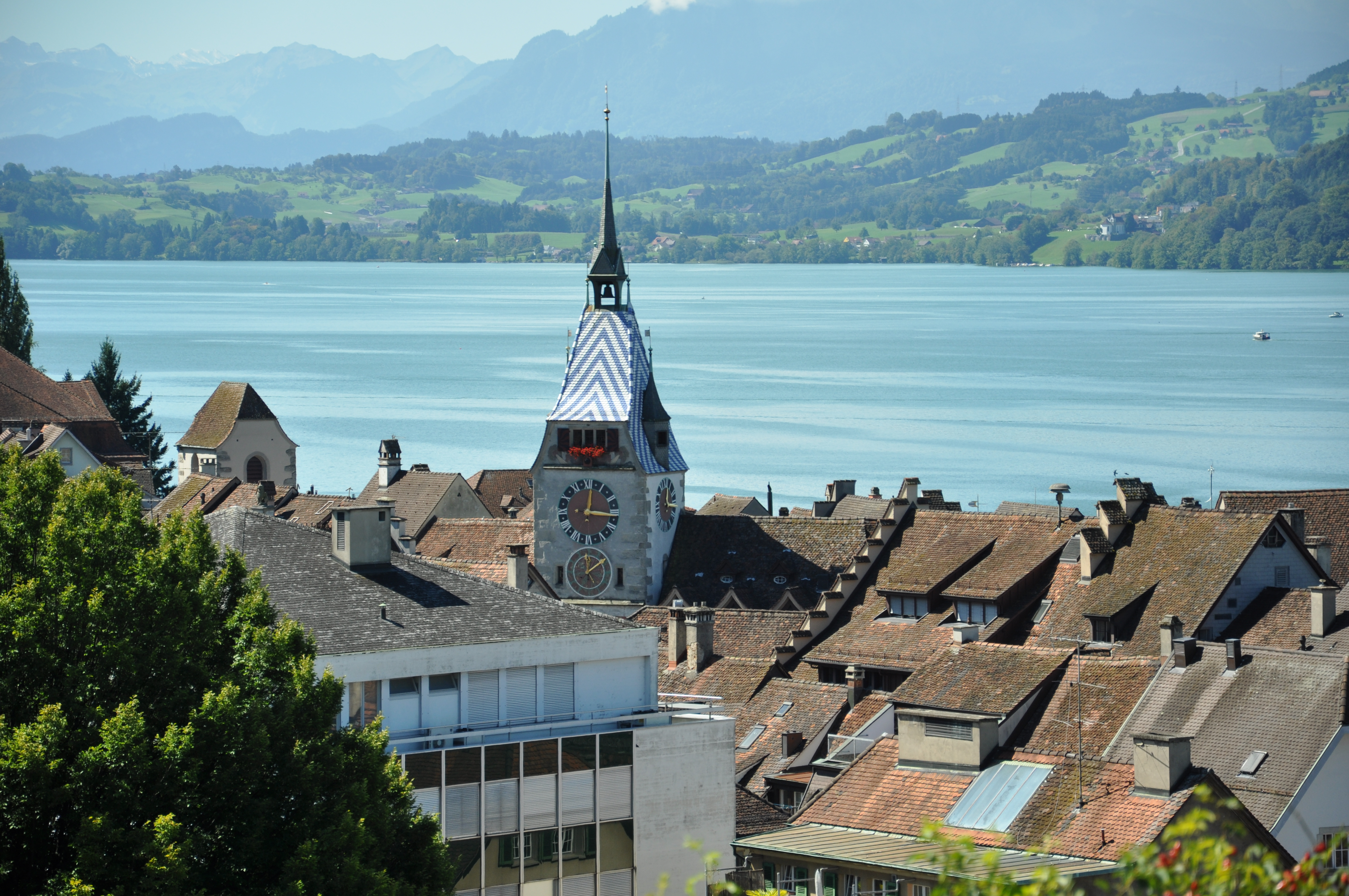 Zug: Zytturm